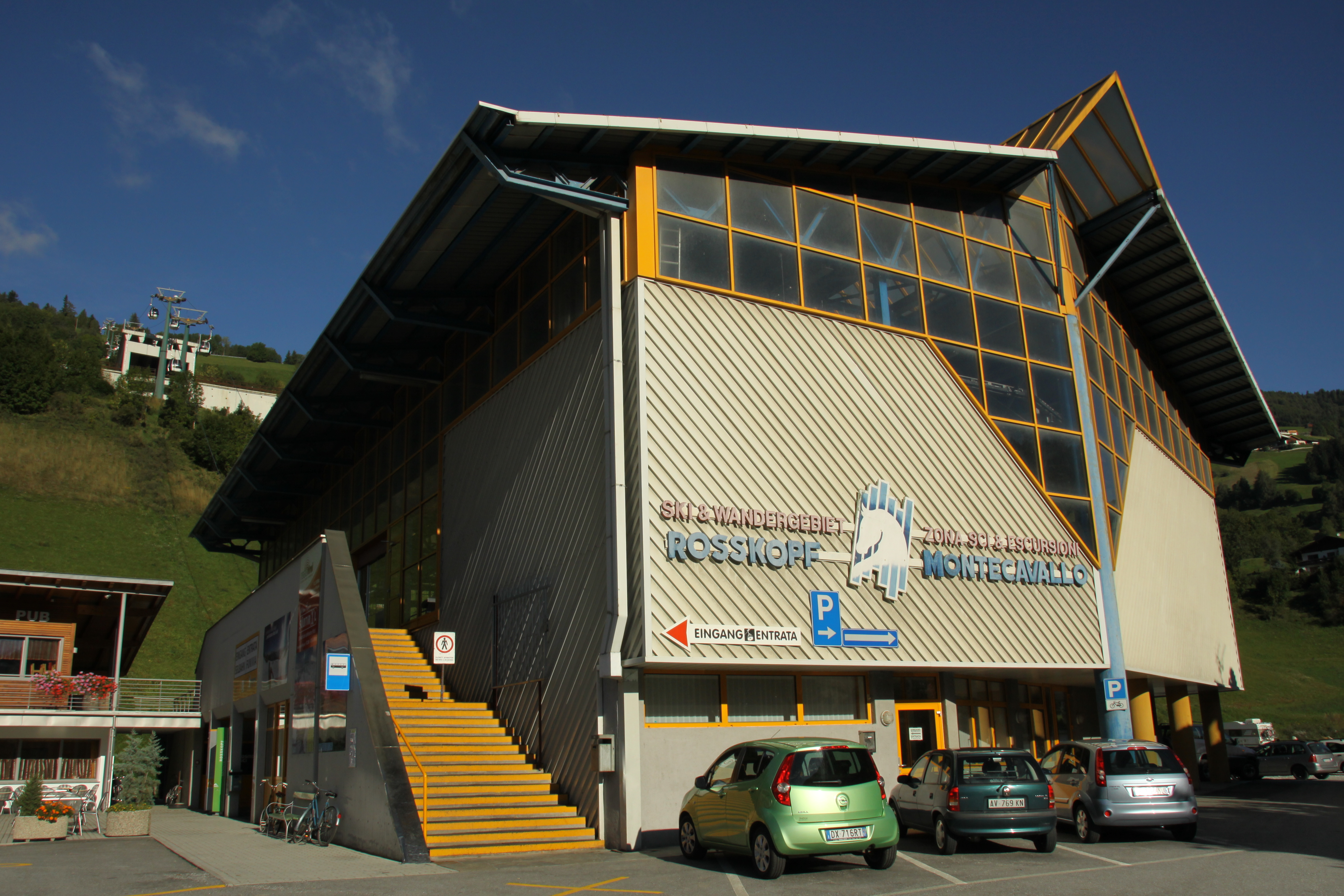 Seilbahn zum Rosskopf